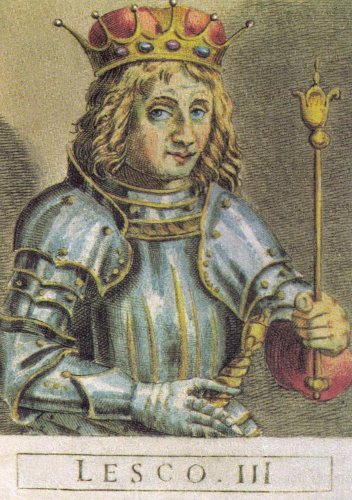 Leszek III